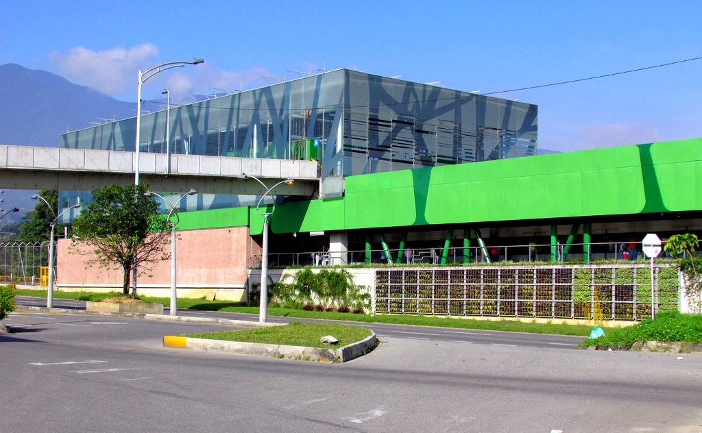 Estación Sabaneta (Metro de Medellín)